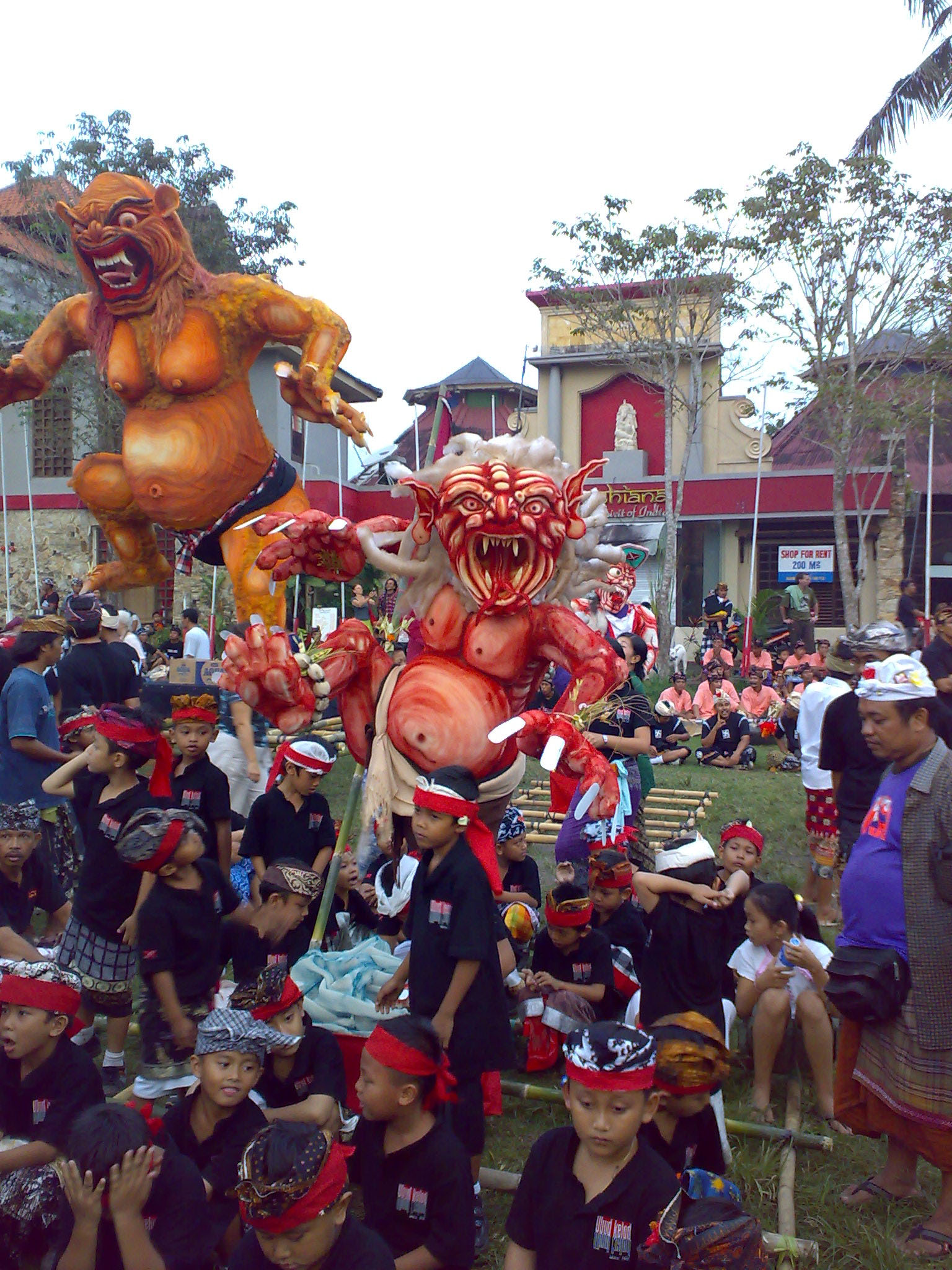 An Ogoh-Ogoh and Balinese children in Ubud, Bali; March 7, 2008.